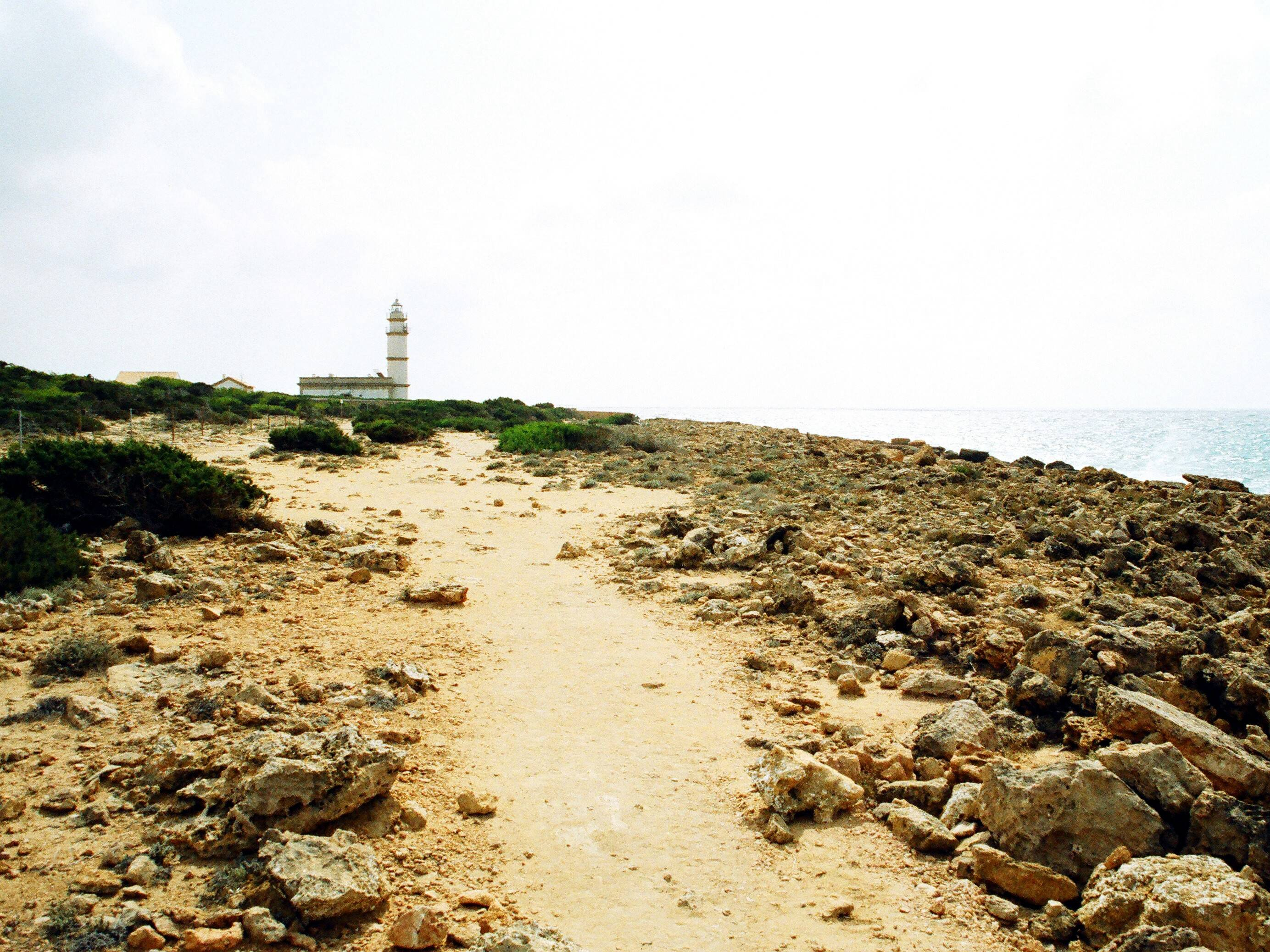 Cap de ses Salines, Südkap der Insel Mallorca (Balearen)